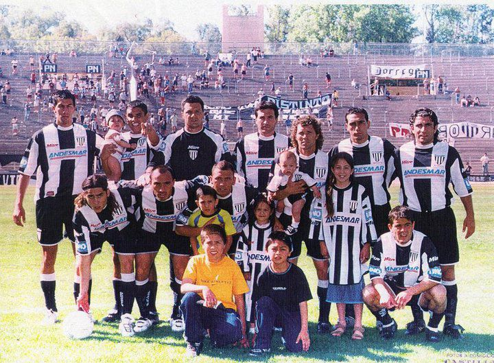 Equipo de Gimnasia y Esgrima en la temporada 2003-2004 del Torneo Argentino A. Parados: Rosales, Medina, De La Riba, Bramuchi, Villalobos, Nonino y Díaz. Agachados: Quispe, J.Montiveros, M.Ksiuck y Lama.